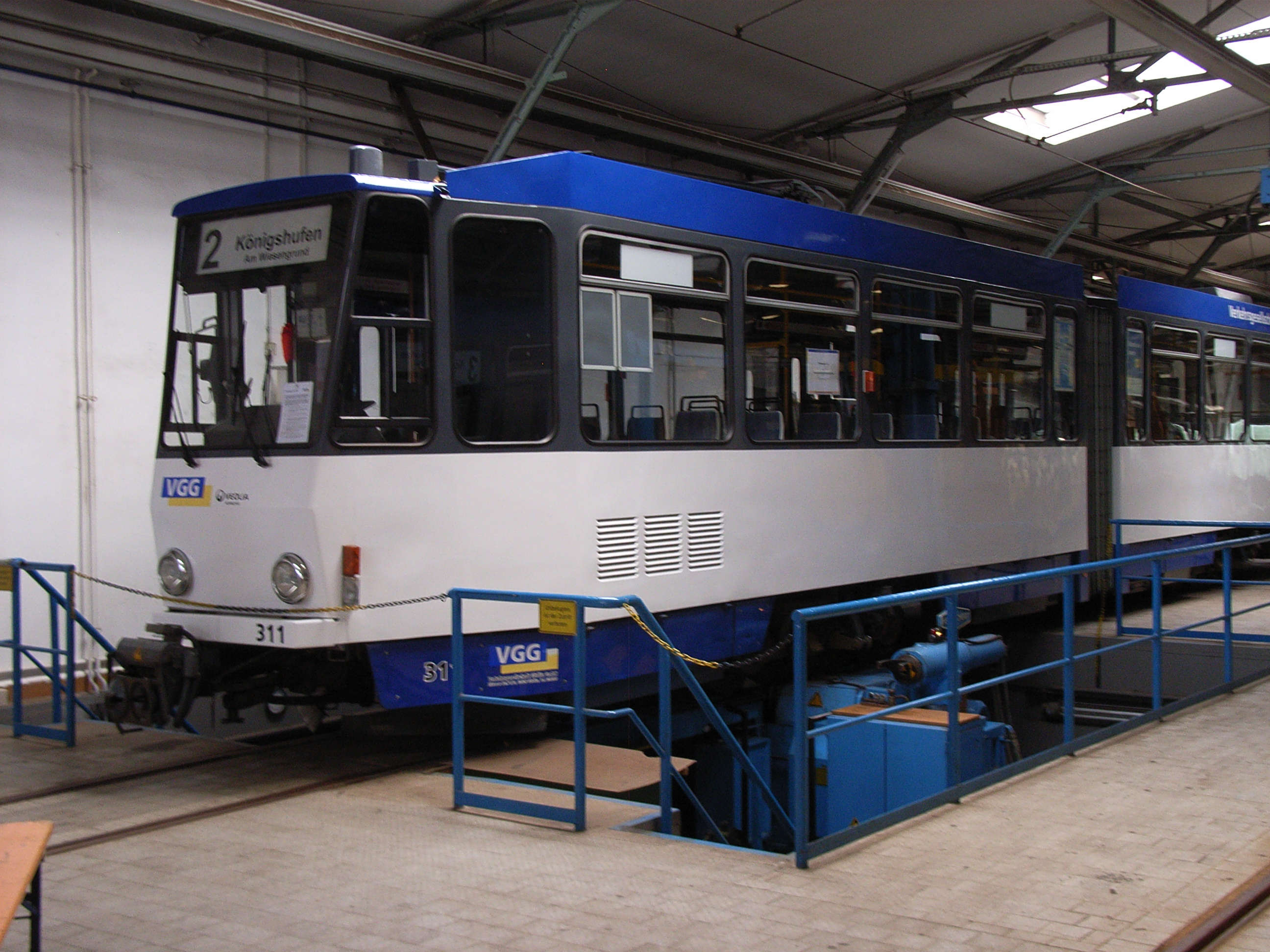 Radsatzschleifstand der Verkehrsgesellschaft Görlitz GmbH